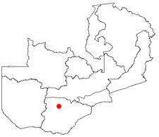 Map: Lage von Namwala in Sambia